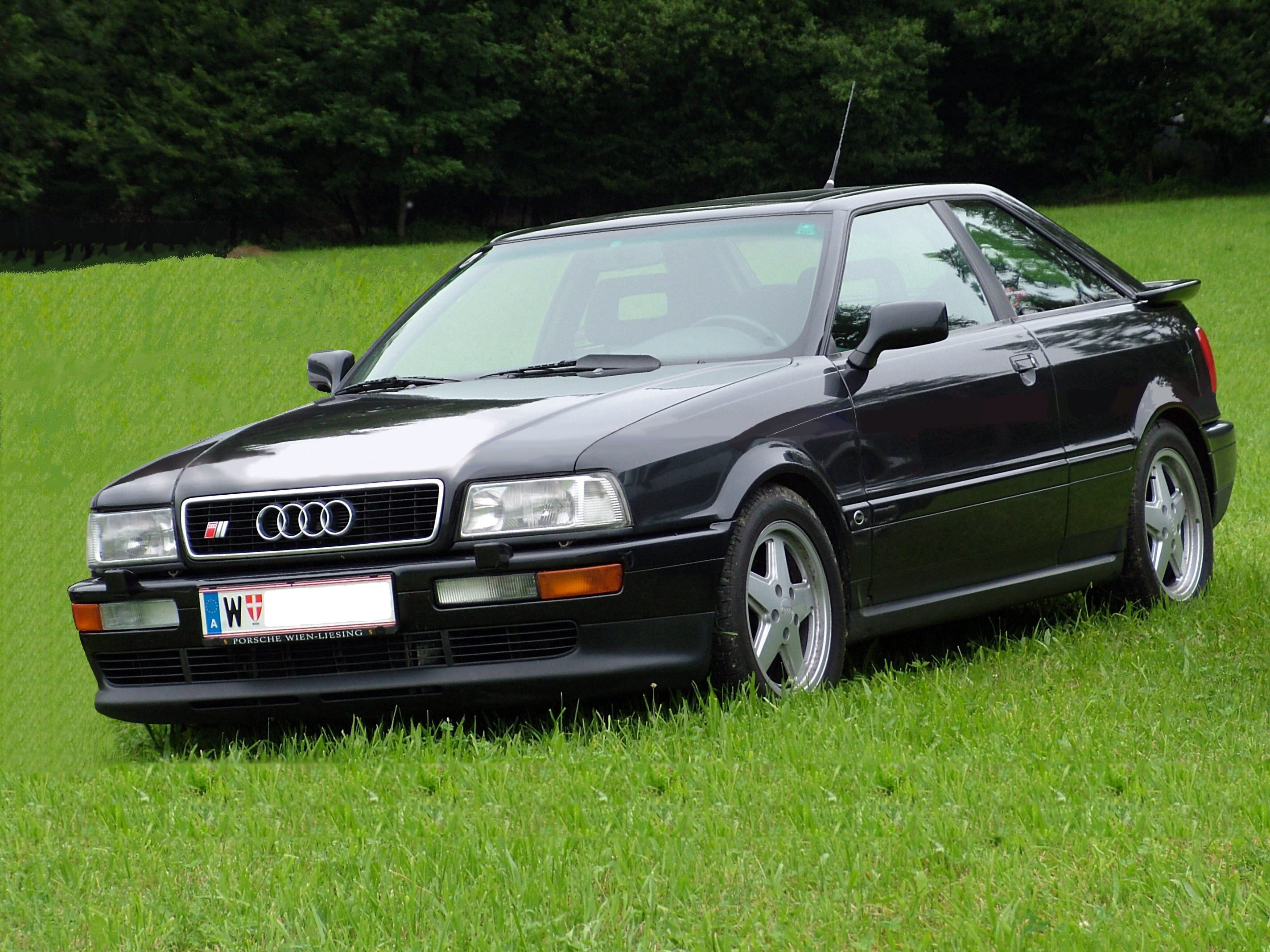 Audi S2, B3 Baujahr 02/92, Motorkennbuchstabe 3B, 5 Gang, 162kw, vollkommen originales erhaltenes Sport Coupe von Audi mit 5 Stern Felgen (hier silber lackiert)